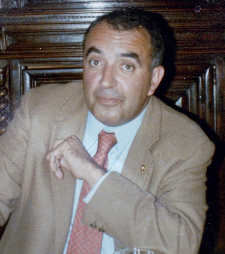 PER 1998